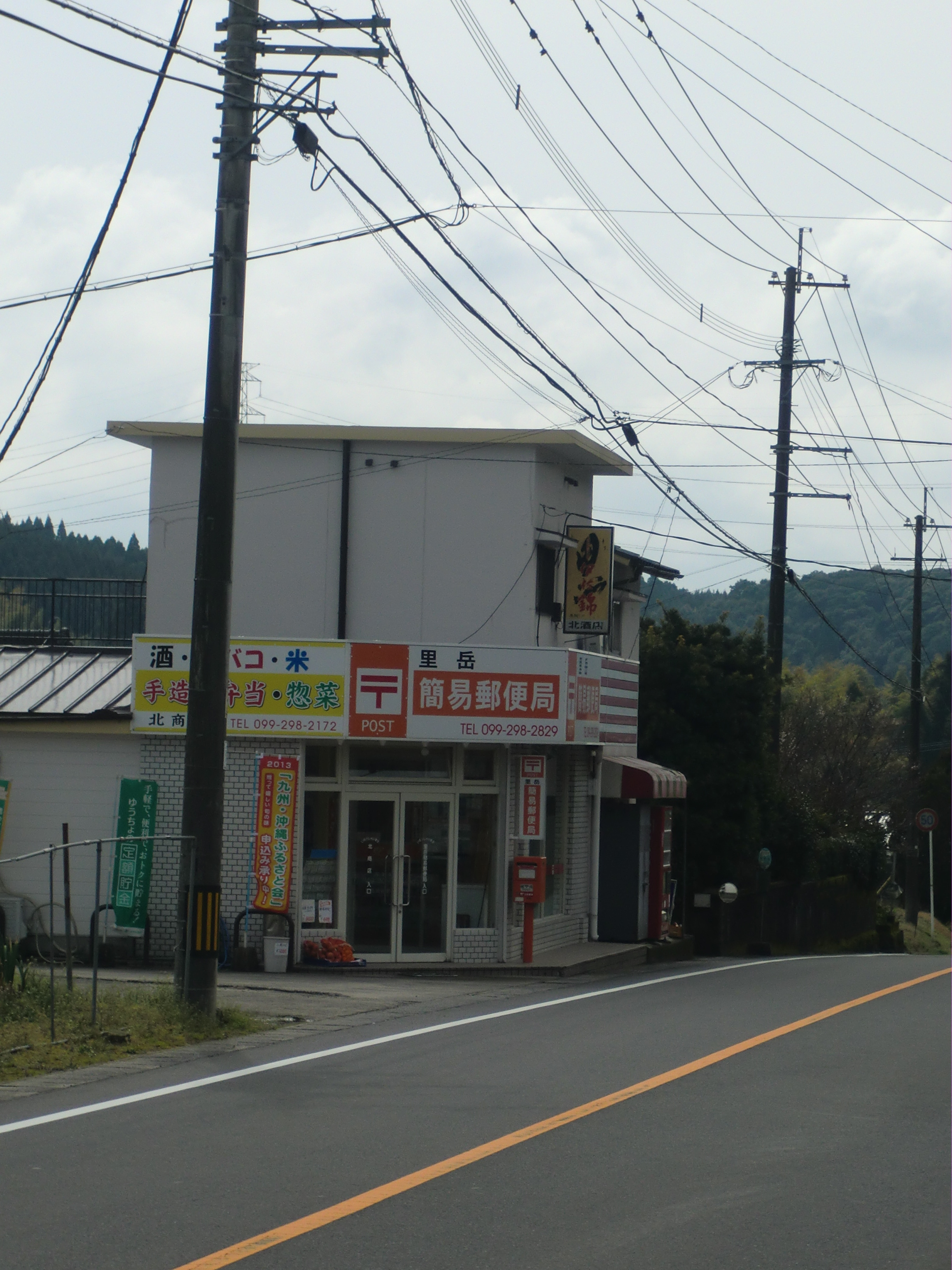 鹿児島市にある里岳（さとだけ）簡易郵便局